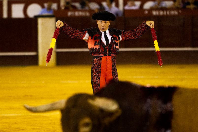 Banderillero de toro de lidia